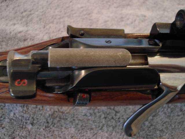 180° Flügelsicherung Mannlicher Schönauer Repetierbüchse.